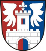 Červený Hrádek